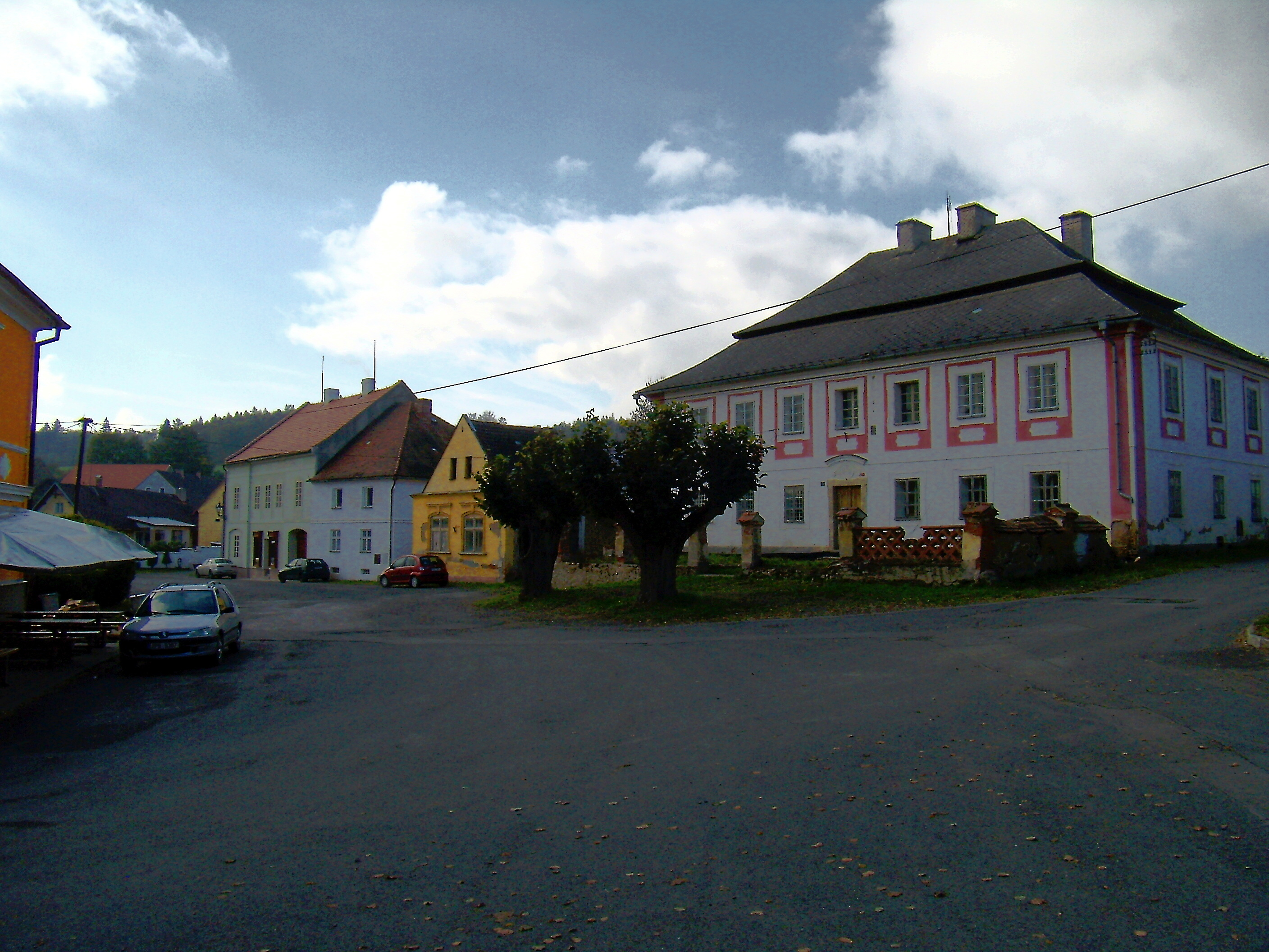 Chudenice - náměstí s farou